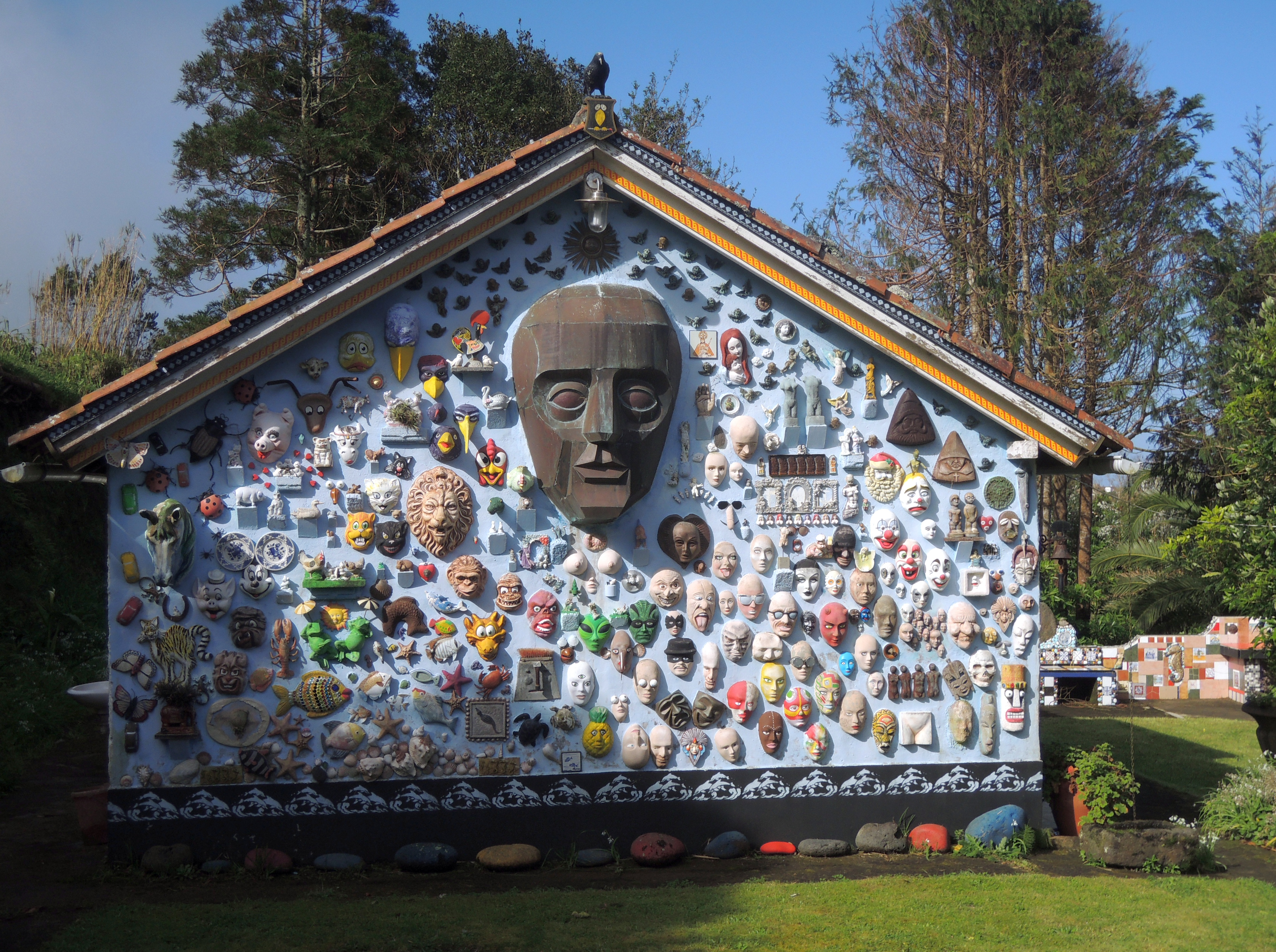 Kunstvoll dekoriertes Ferienhaus in Joao Bom, Sao Miguel, Azoren